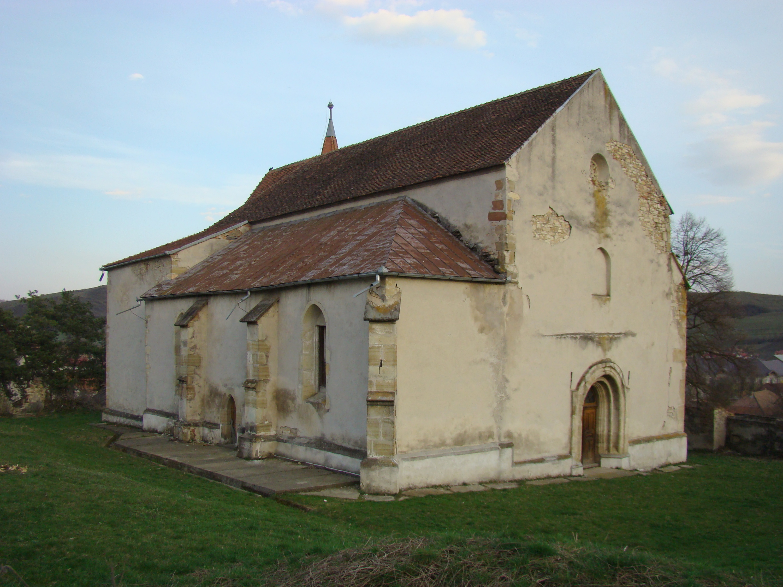 Biserica evanghelică, sat Lechința; comuna Lechința, județul Bistrița-Năsăud 01